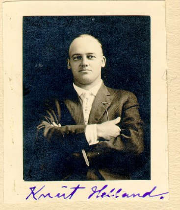 Knut Gunnarsson Helland (1880-1920).